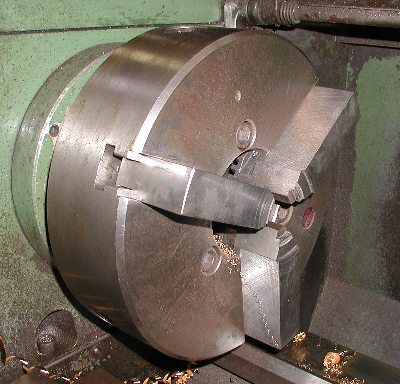 Dreibacken-Spannfutter einer Drehmaschine